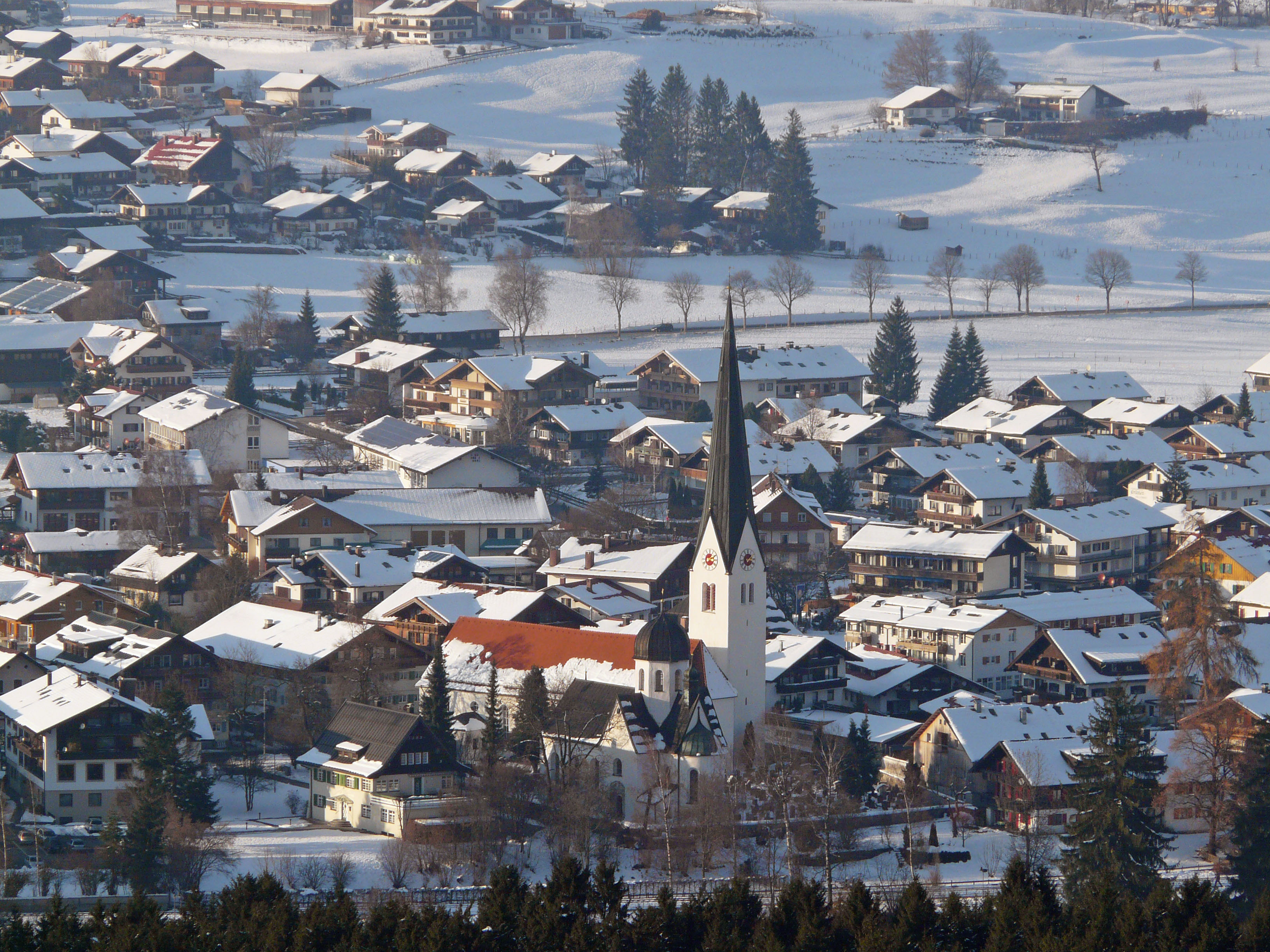 Fischen im Allgäu von Südosten